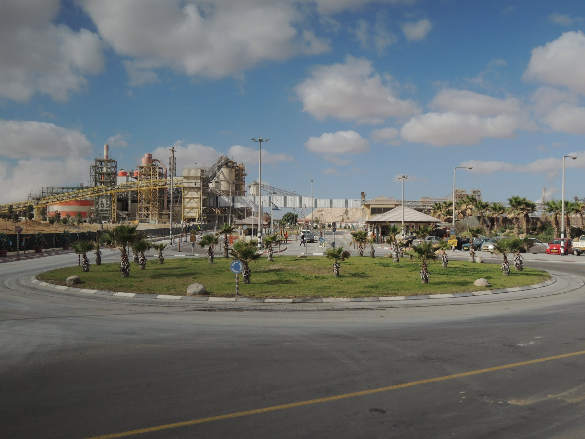 Rotem Amfert Ltd.